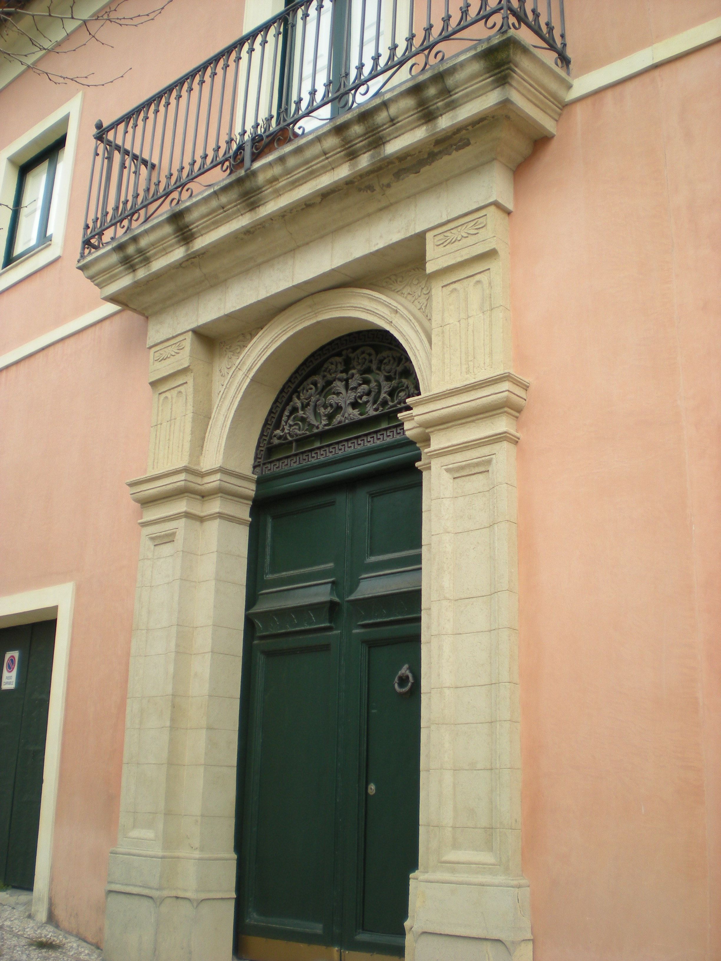 Palazzo De Michele